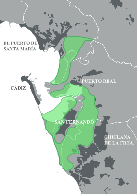 Limites del Parque